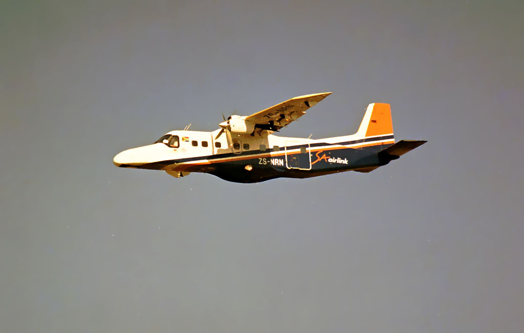 On departure from R03L.